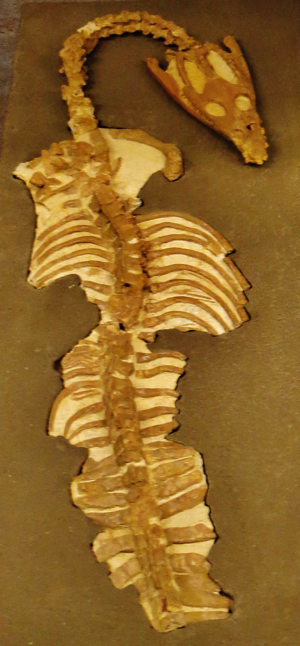 Fossil - Took the picture at Natural History Museum, Karlsruhe